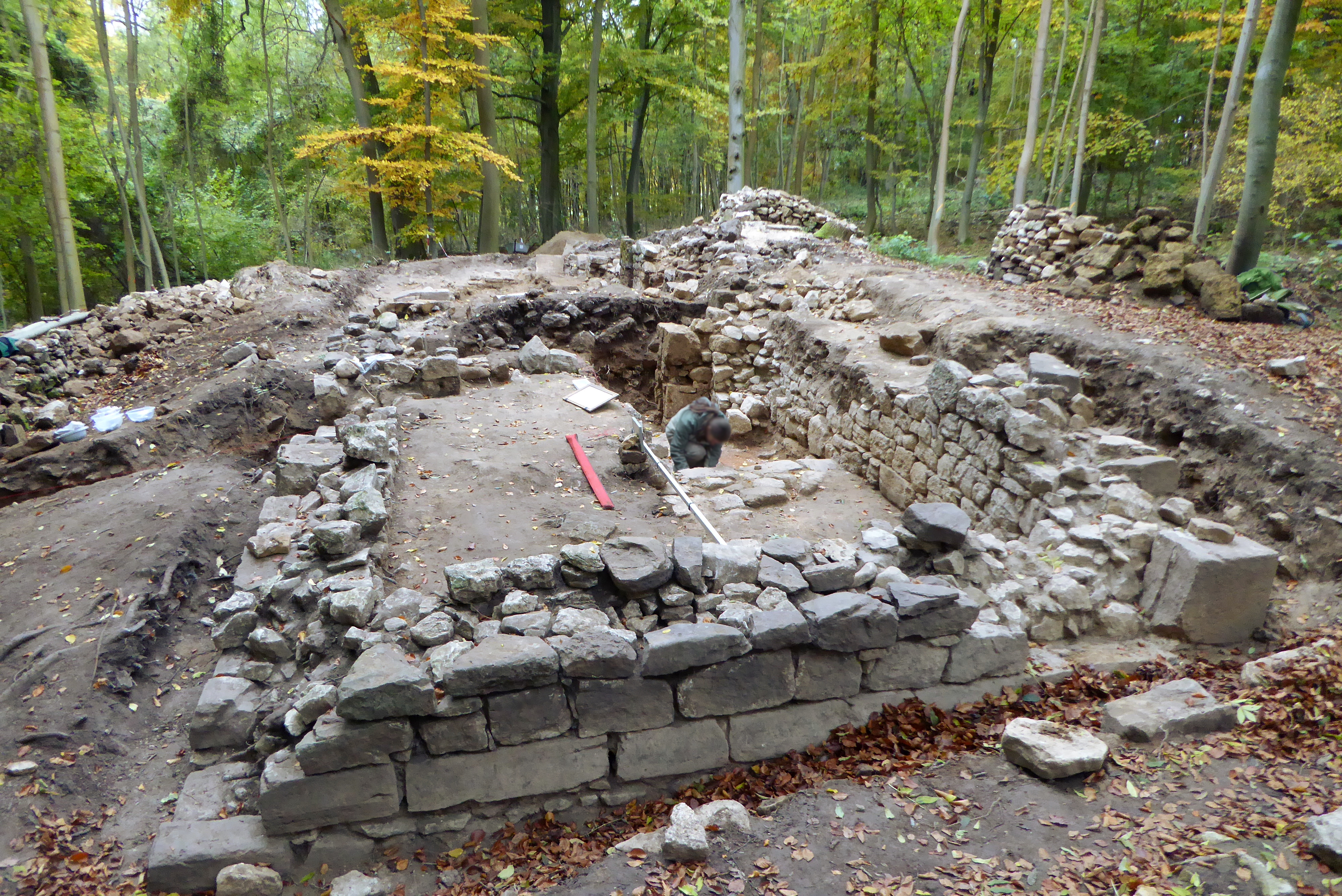 Archäologische Grabung an einer Kirchenruine nahe Asche, Stadt Hardegsen, Südniedersachsen. Die mittelalterliche Kirche war innenseitig verputzt, sie wies einen Turm (ganz hinten), ein eingewölbtes zweijochiges Kirchenschiff und einen Chorraum (vorne) auf, der wahrscheinlich mindestens einmal erweitert wurde. Der Ostteil des Chorraums war gegenüber dem restlichen Teil noch einmal erhöht, das originale Fußbodenniveau konnte festgestellt werden (nördlicher, im Bild rechter Bereich des Chorraums). Die Außenwand wies eine Sockelabschrägung aus sorgfältig behauenen, geflächten Steinen auf. Im Süden des Chorraums befand sich ein Zugang für den Priester.